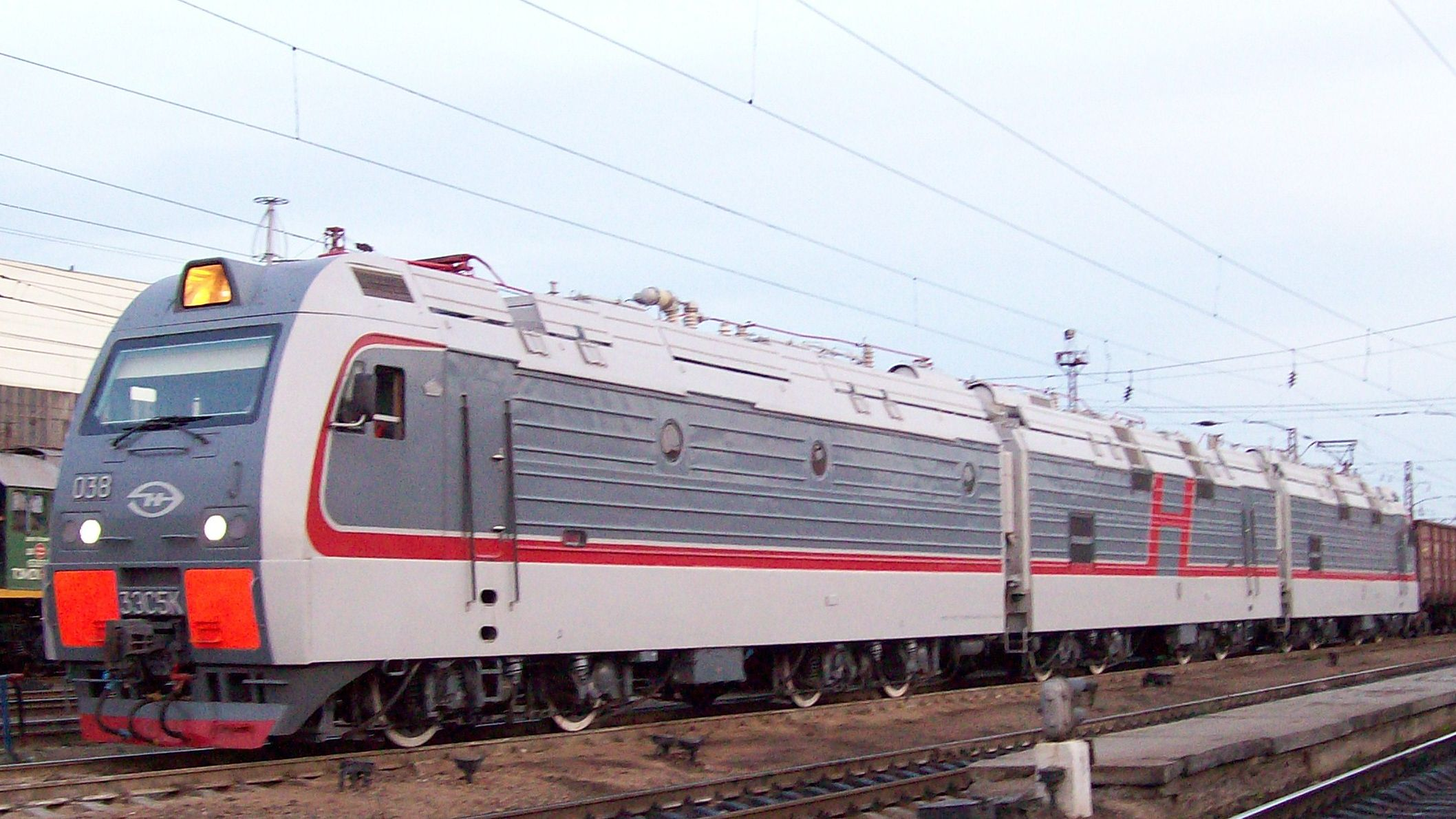 Электровоз "Ермак" 3ЭС5К на станции Уссурийск